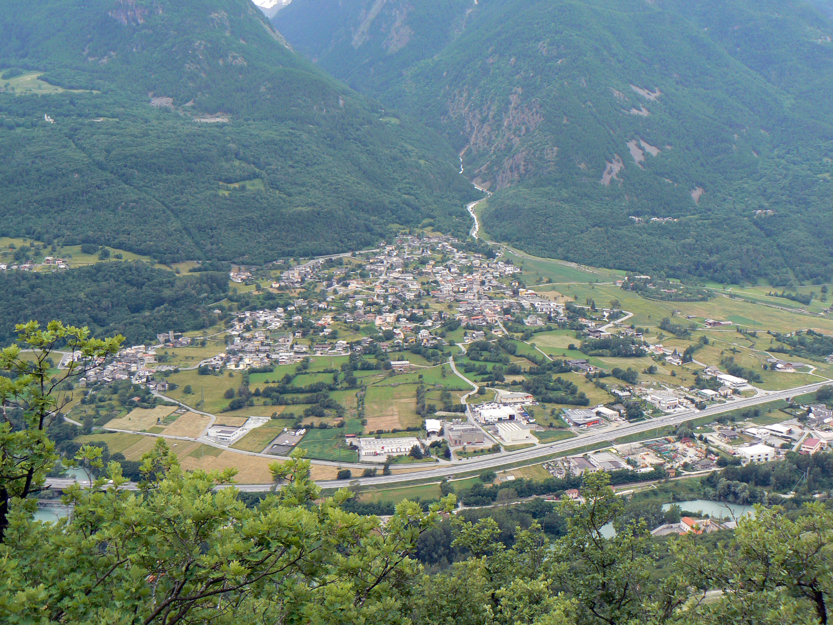 panorama di Saint-Marcel, Valle d'Aosta, Italia.